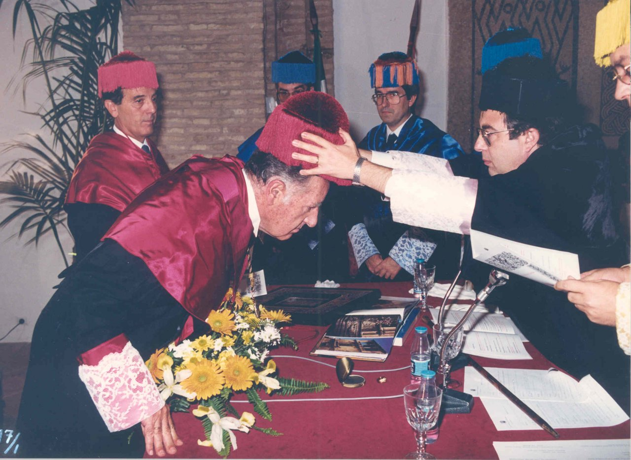 Nombramiento de Manuel Albaladejo como doctor honoris causa por la Universidad de Córdoba. 26 de abril de 1988